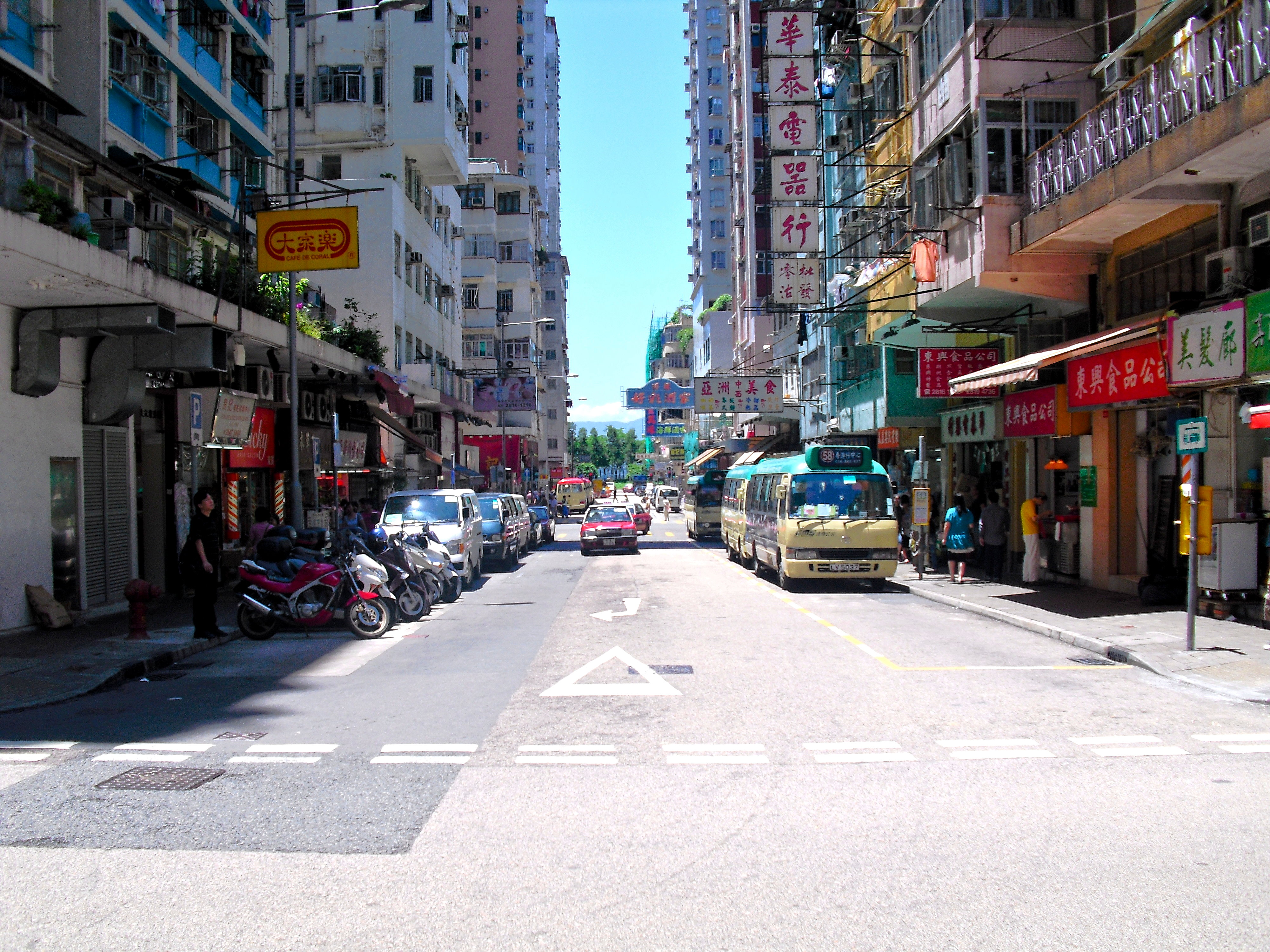 香港北街